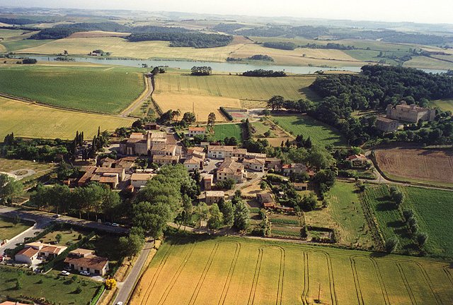 Vue générale de Baraigne au fond le barrage sur la Ganguise